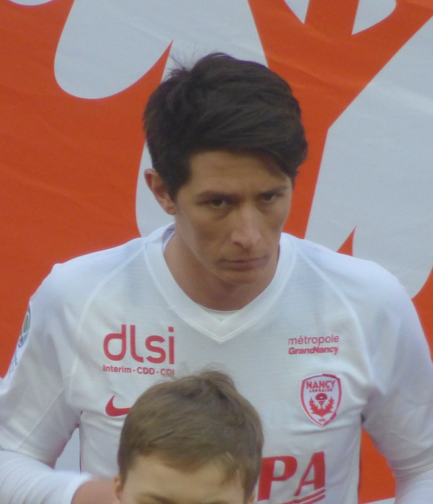 Laurent Abergel avant le match RC Lens / AS Nancy-Lorraine, comptant pour la vingt-et-unième journée du championnat de France de football de Ligue 2 2018-2019, le 19 janvier 2019, au Stade Bollaert-Delelis de Lens.